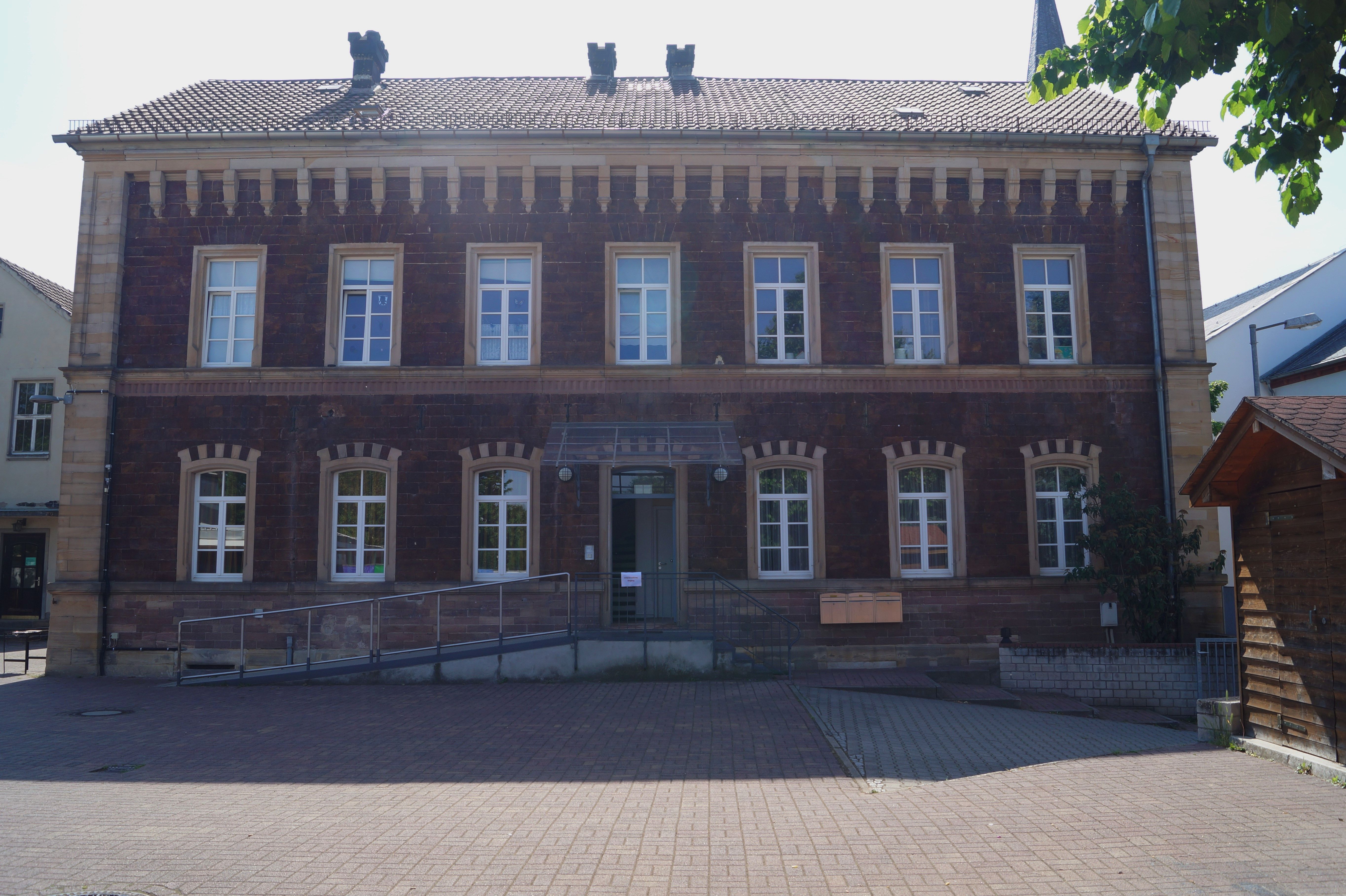 Wiesengrundschule Ostansicht Worms-Heppenheim